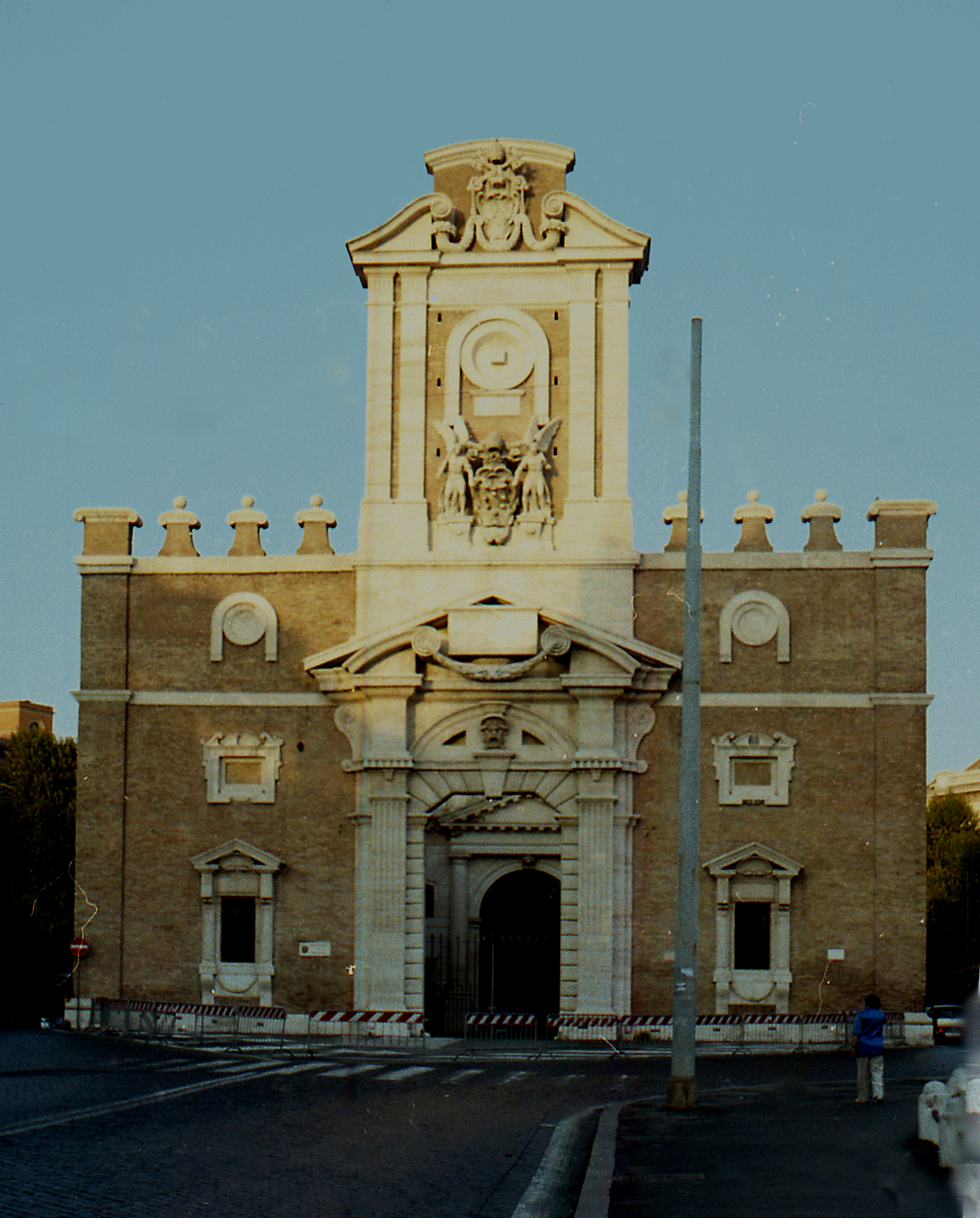 Порта Пиа